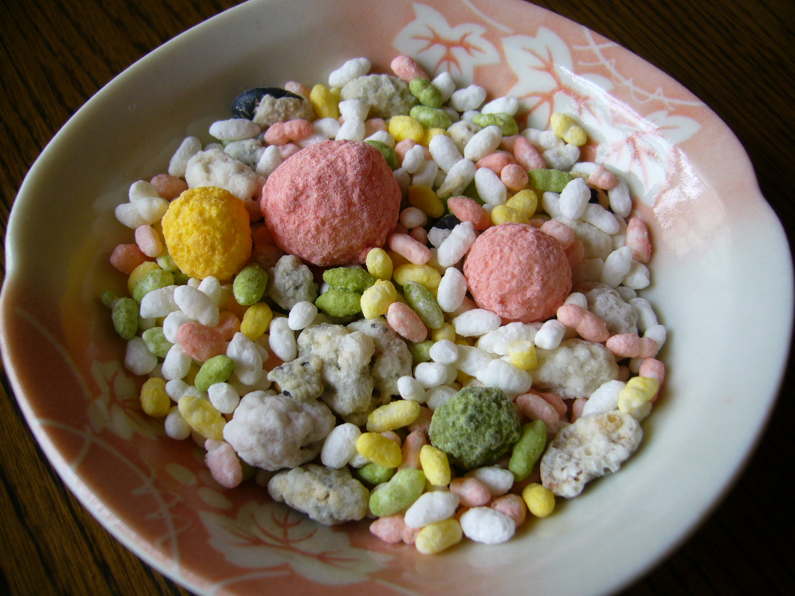 Hina arare,katori-city,japan